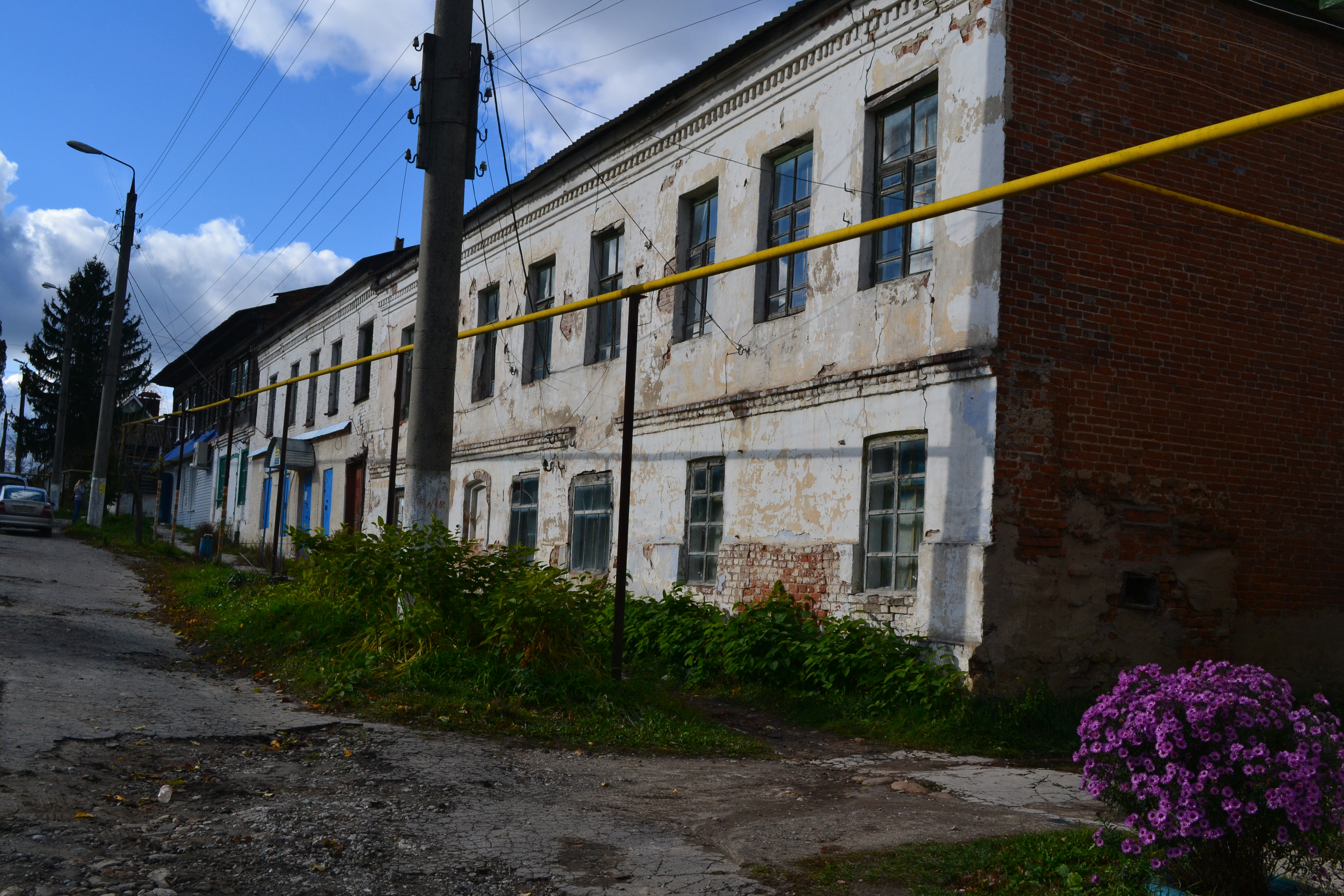 Улица имени Героя в Чекалине